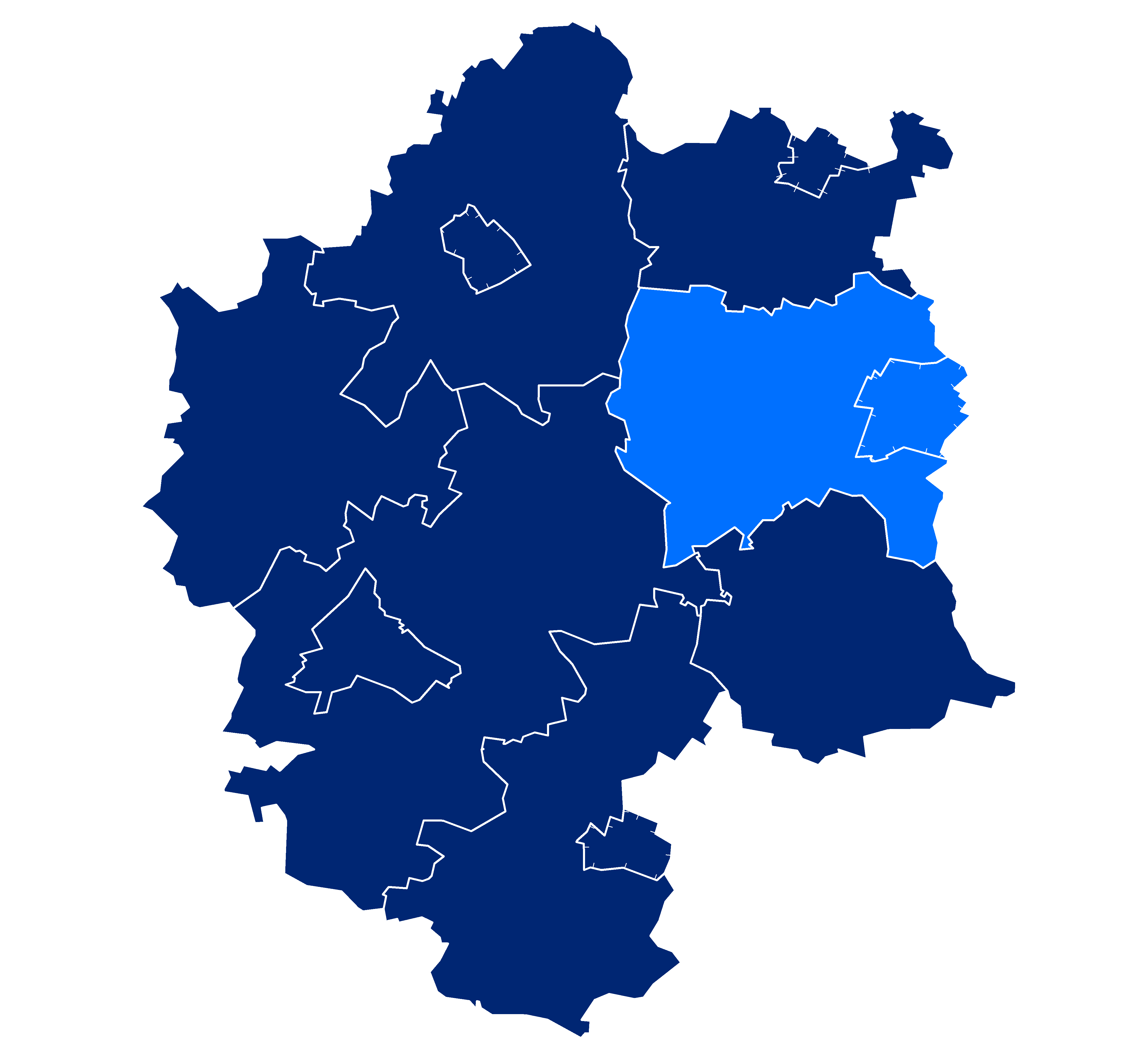 Gmina miejsko-wiejska Syców na tle powiatu oleśnickiego